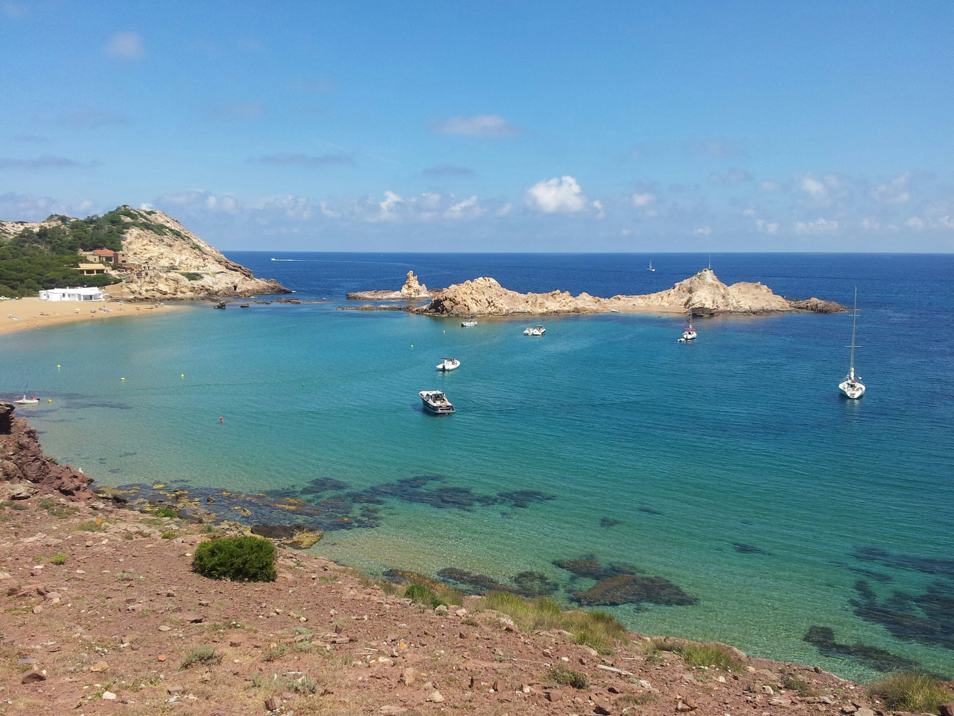 Cala Pregonda, Menorca